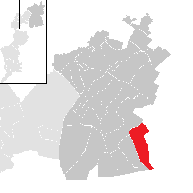 Bezirk Neudsiedl am See